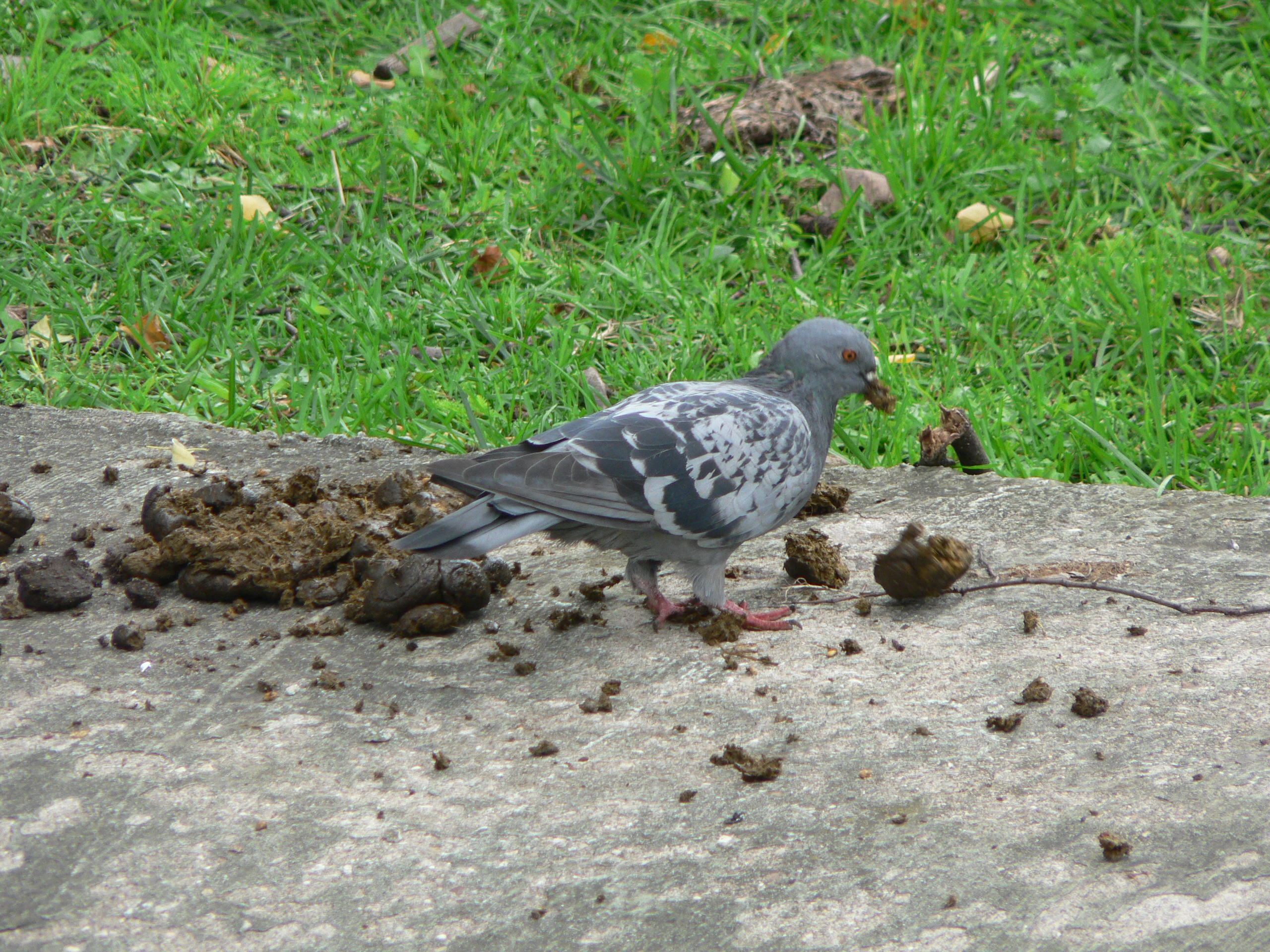 копрофагия